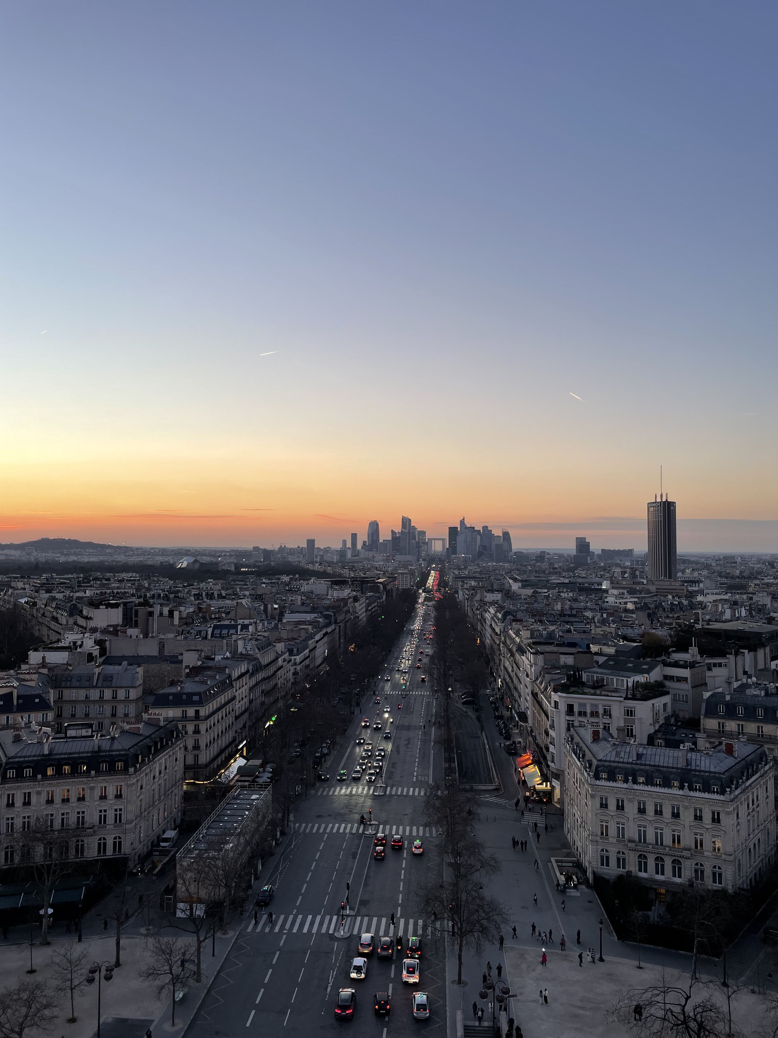 La Défense